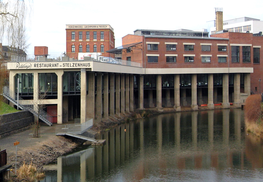 Stelzenhaus in Leipzig-Plagwitz (erbaut 1937–1939), Ansicht von der Fußgängerbrücke über den Karl-Heine-Kanal (aus Richtung Osten)